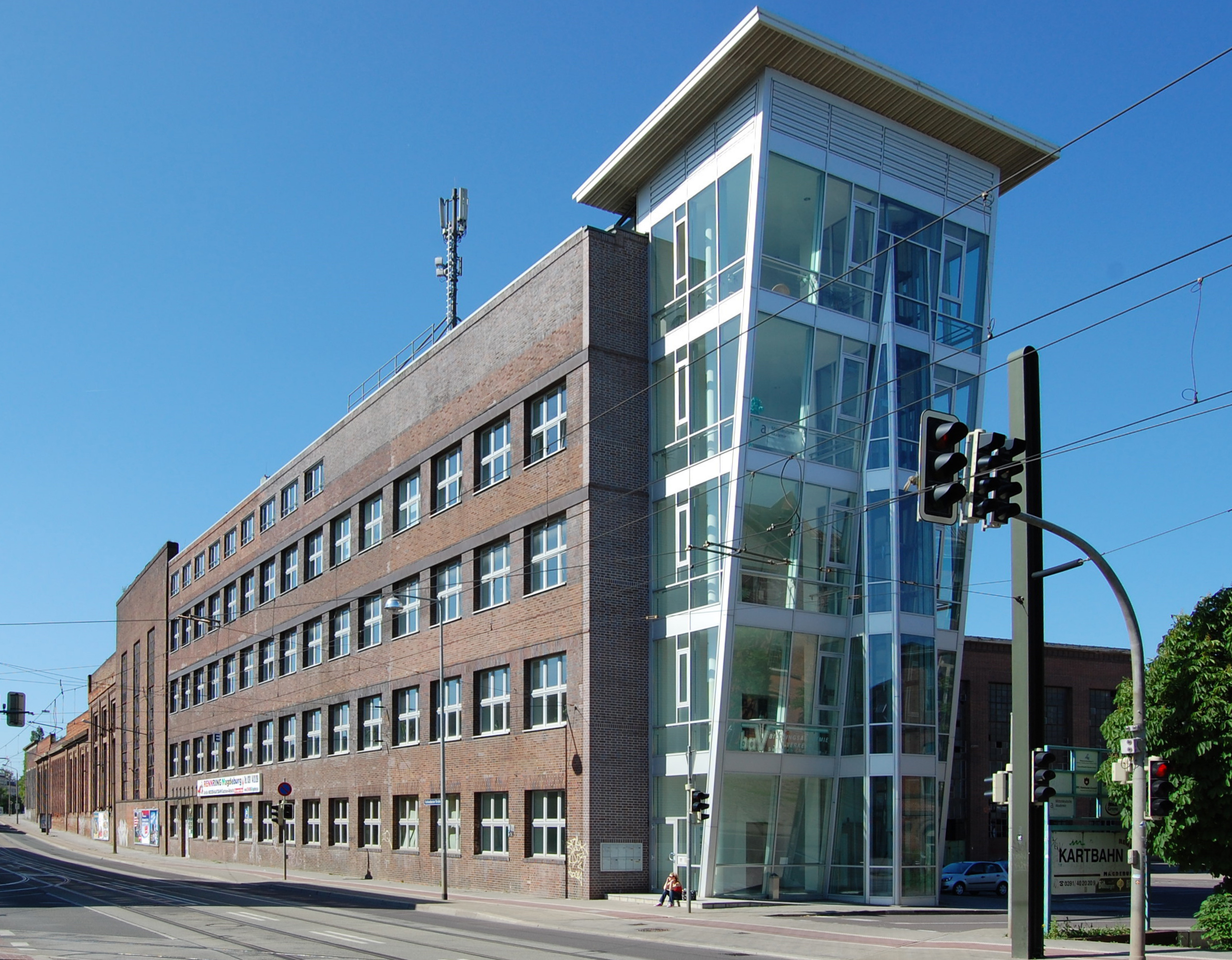 Gebäude der ehemaligen Maschinenfabrik Buckau in Magdeburg-Buckau. Front zur Schönebecker Straße, Blick von Süden